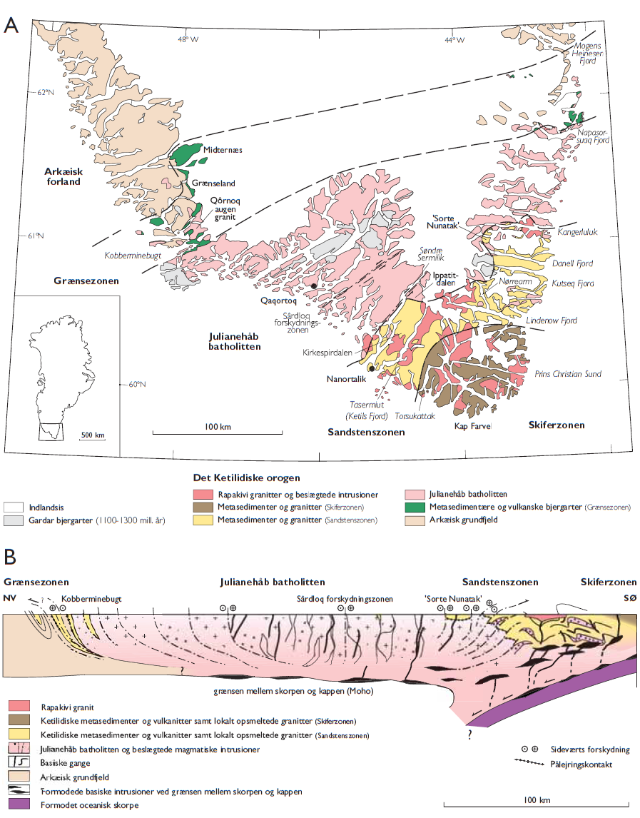 Geologisk kort over den ketilidiske bjergkæde i Sydgrønland